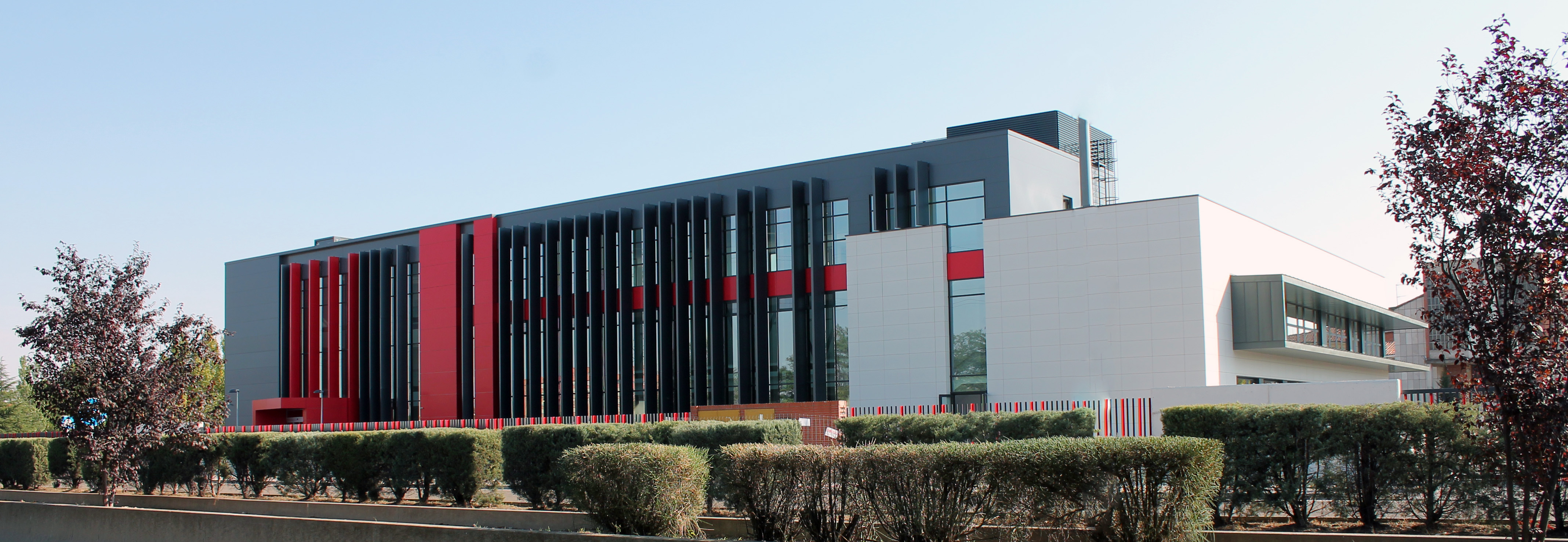 Fachada del nuevo edificio del Campus UEMC